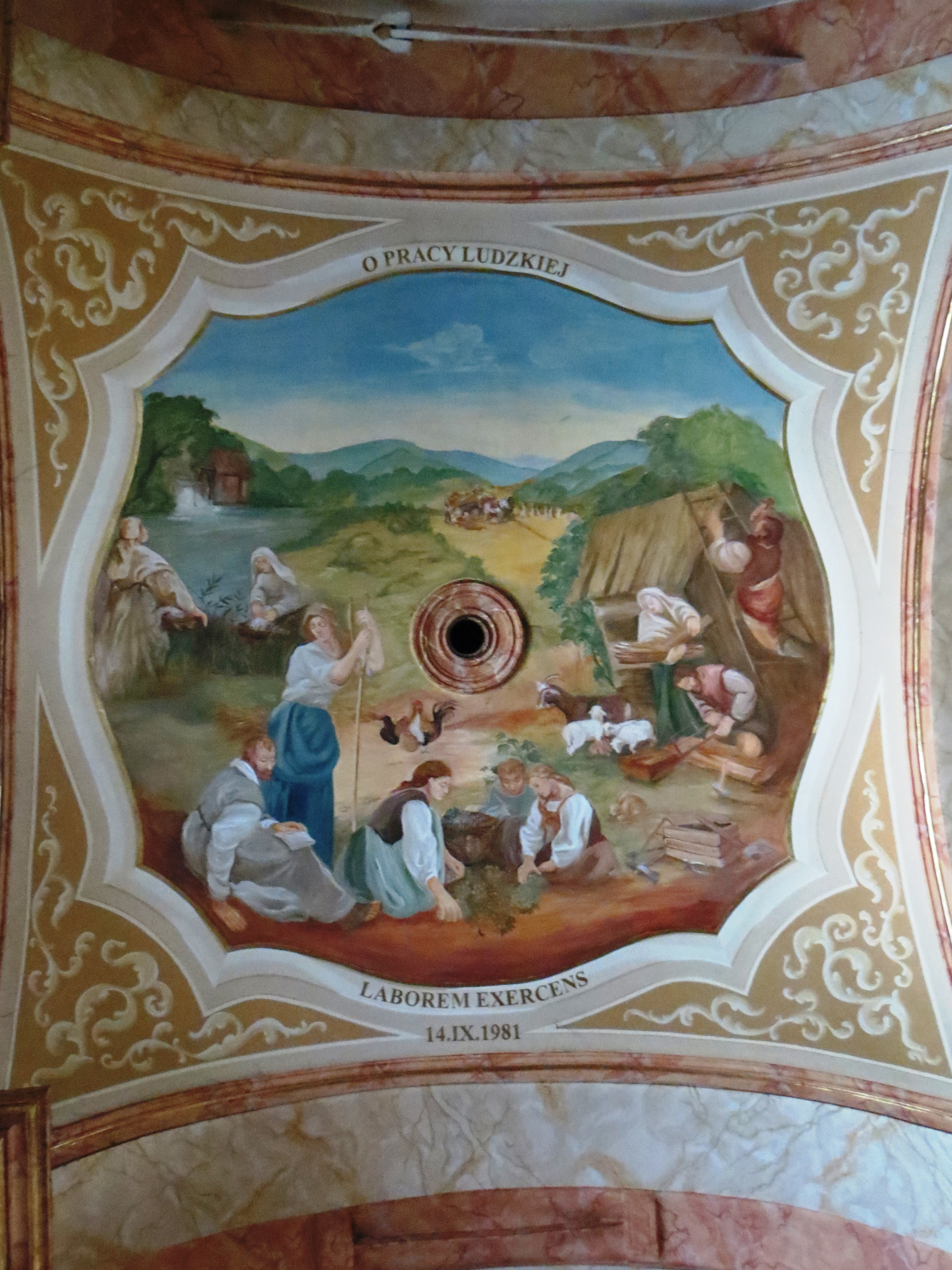 Malowidła na suficie w bazylice ONMP w Wadowicach.